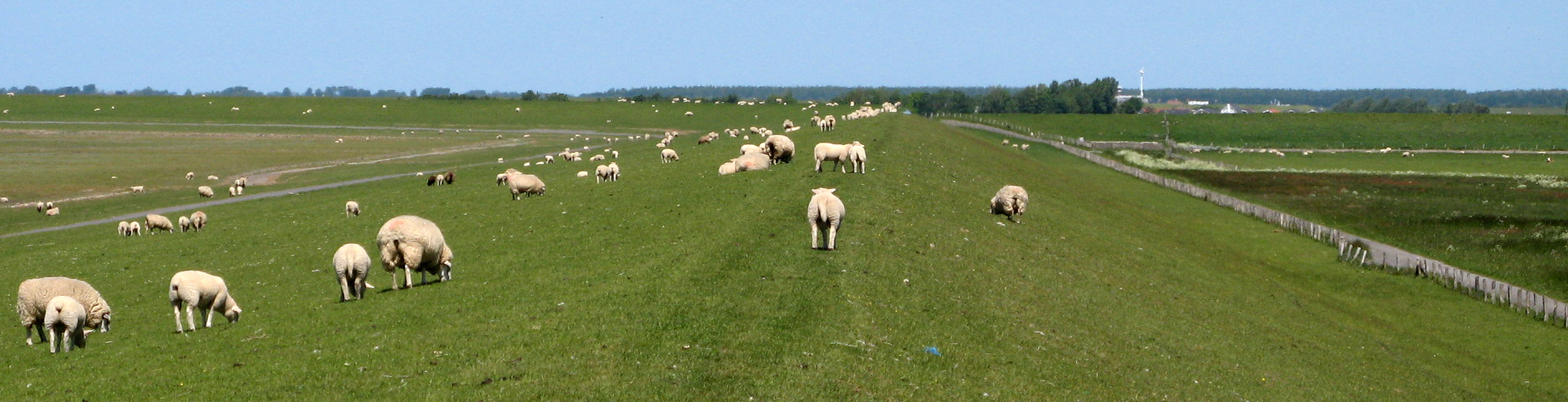 Dike Wesselburenerkoog